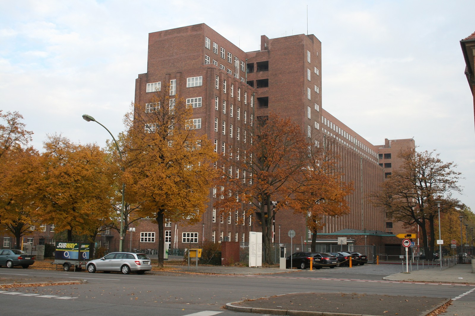 Berlin-Spandau Nonnendammallee 104 108